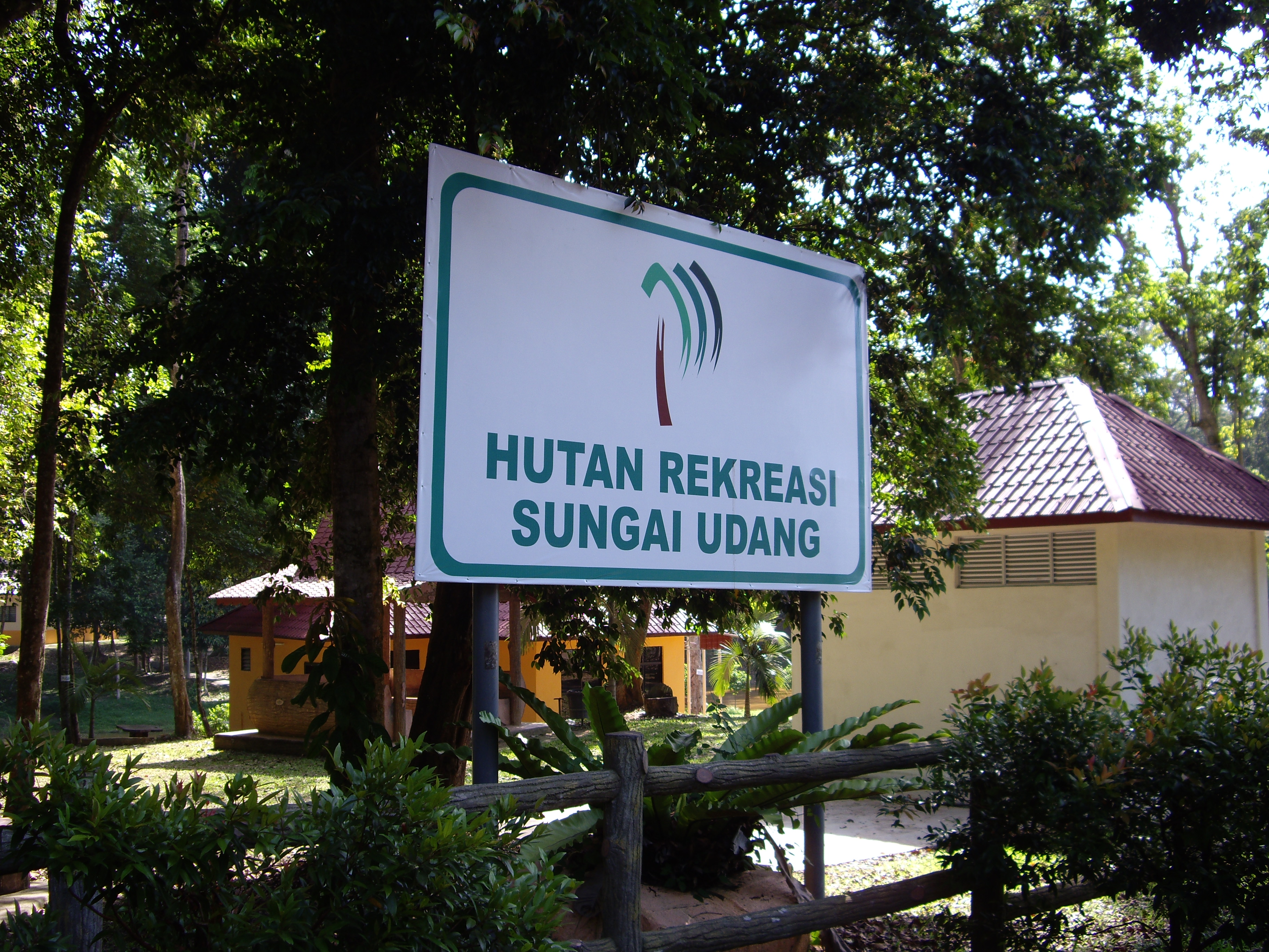 Papan tanda ke Hutan Rekreasi Sungai Udang Melaka